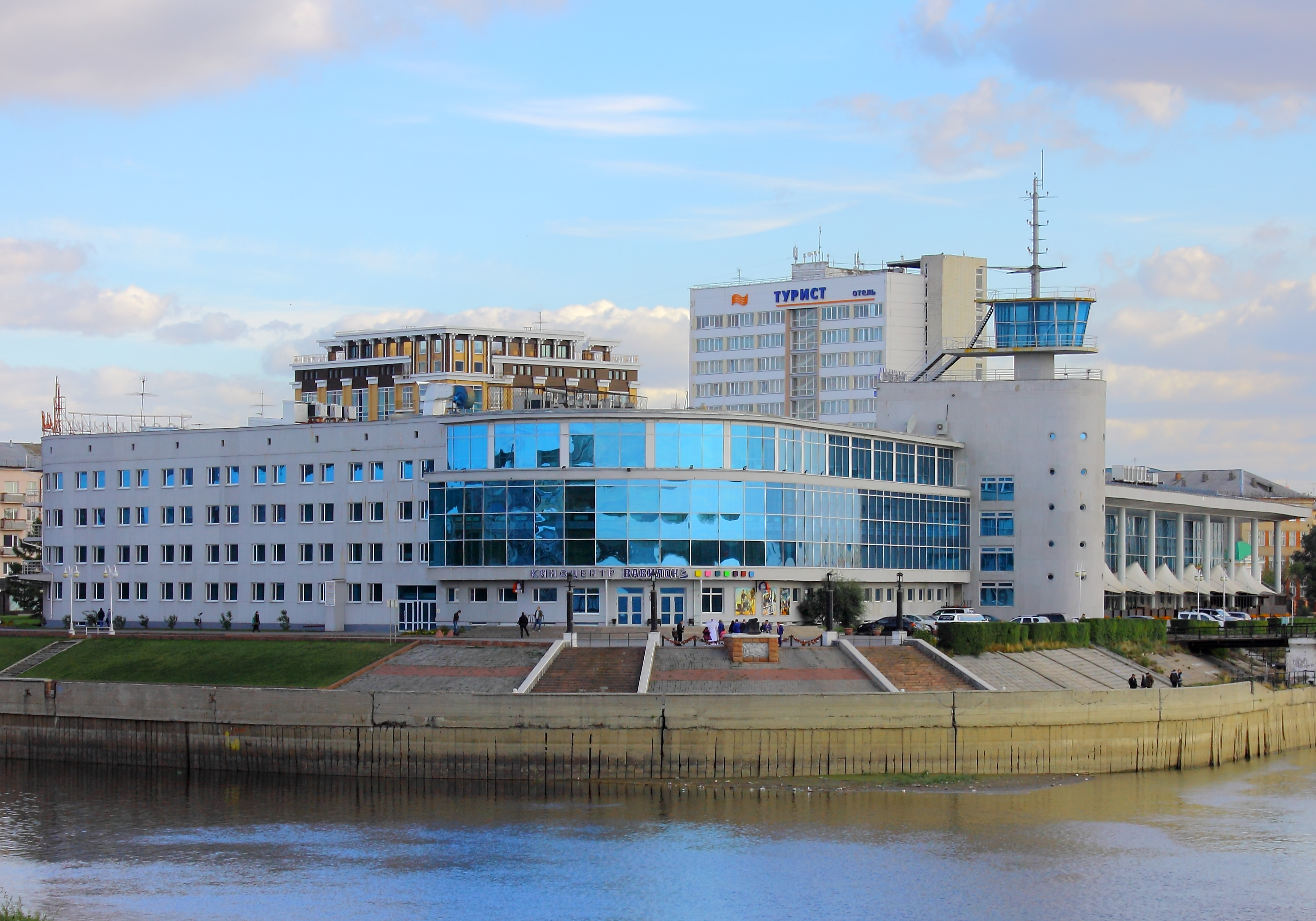 Здание речного вокзала: площадь Бухгольца, Омск, Омская область